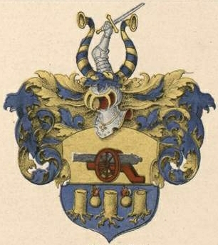 Güldenstubbe suguvõsa aadlivapp